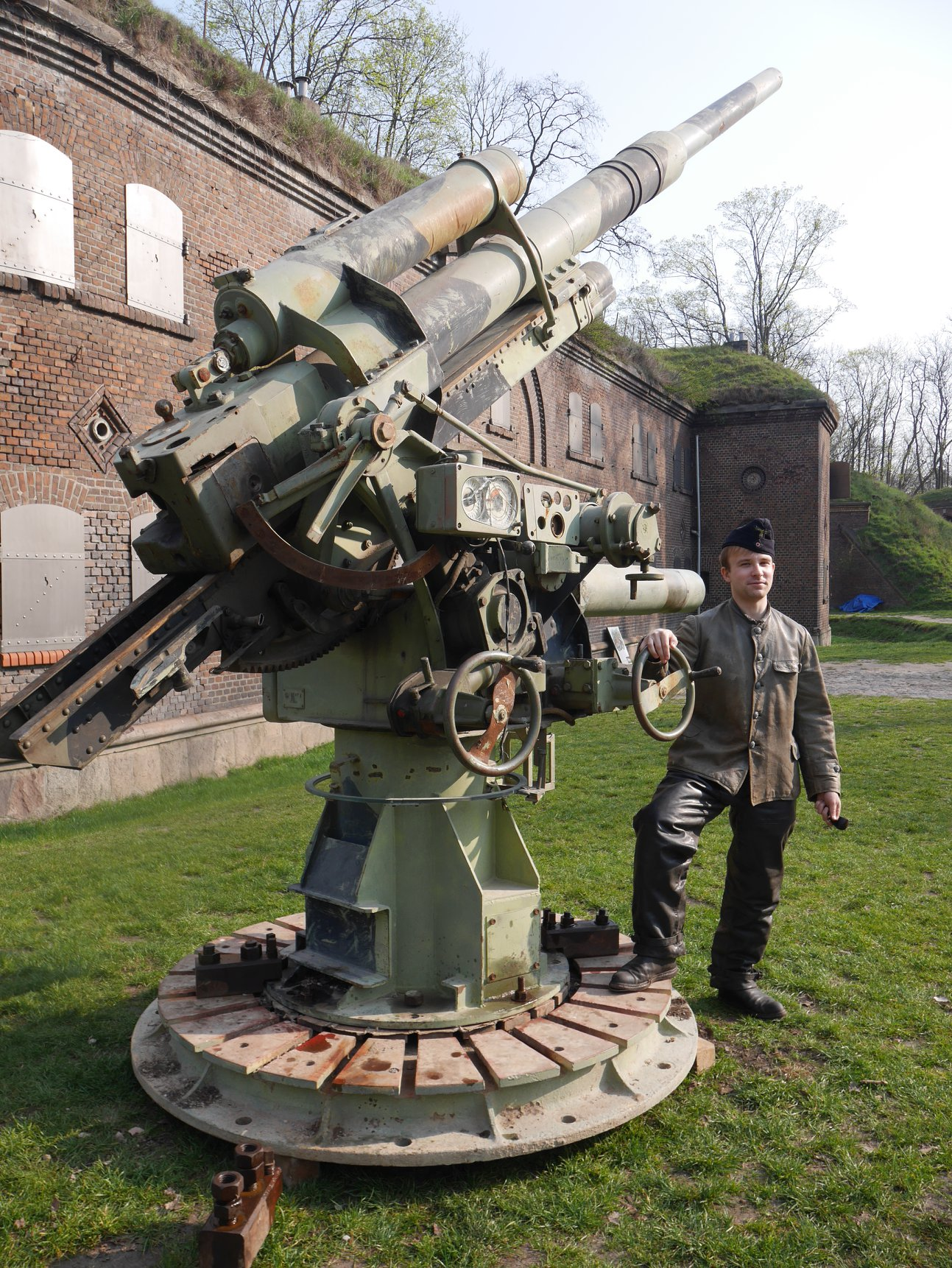 Flak 37 w Forcie Gerharda w Świnoujściu